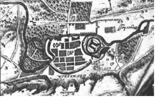 Szkic planu Bydgoszczy wg ryciny Erika Dahlberga z 1657 r.